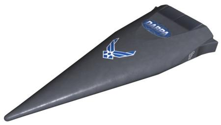 Entwurf des Hypersonic-Technology-Vehicle HTV-1 im Rahmen des FALCON-Programms der US Air Force und der DARPA Der US-Konzern Lockheed Martin erhielt als einziger im August 2004 den Auftrag, HTVs für das Gemeinschaftsprogramm FALCON der US Air Force und der DARPA zu bauen. Die ursprüngliche HTV-Konstruktion (HTV-1) sollte eigentlich im September 2007 Flugtests absolvieren, noch unterstützt von Booster-Raketen, wobei eine Geschwindigkeit von Mach 19 (!) in einer Höhe von 30 bis 45 Kilometer erreicht werden sollte. Im Mai 2006 wurde der Bau von zwei HTV-1-Flugzeugen allerdings abgebrochen, weil der Zulieferer C-CAT ernste Probleme mit der Delaminierung der kurvenförmigen Anströmkanten der Außenhaut der Maschinen gehabt haben soll. Stattdessen soll nun direkt zu den Projekten HTV-2 bzw. HTV-3 übergegangen werden, die für den Zeitraum von 2007 bis 2010 geplant sind. Die dabei zu entwickelnden Maschinen sollen bei rund 3,5 bis 4,5 Metern Länge etwa 900 Kilogramm wiegen. Auch sie sind für den Start noch auf Booster angewiesen, wie es bei Andreas Parsch heißt.